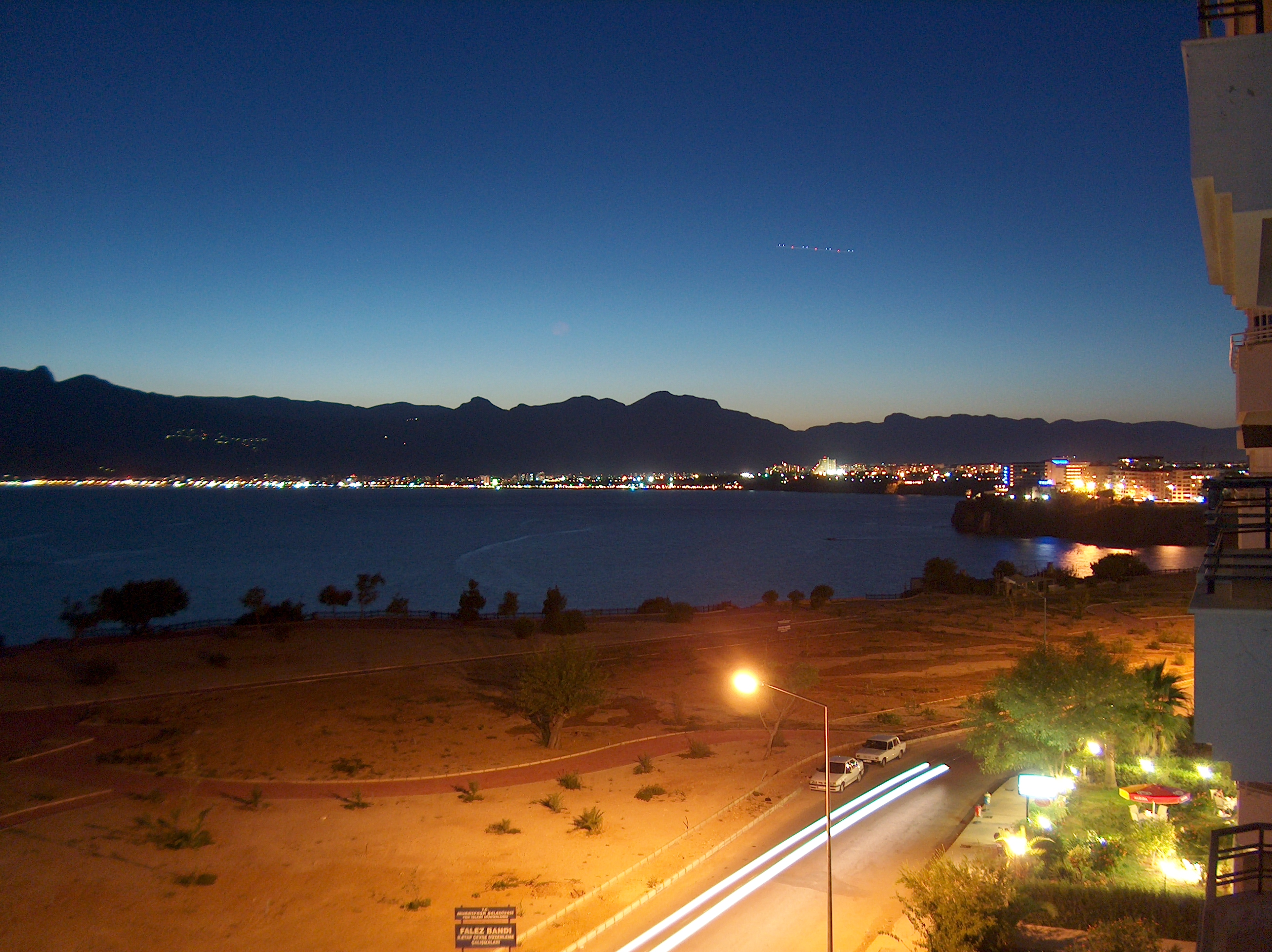 Antalya at night.